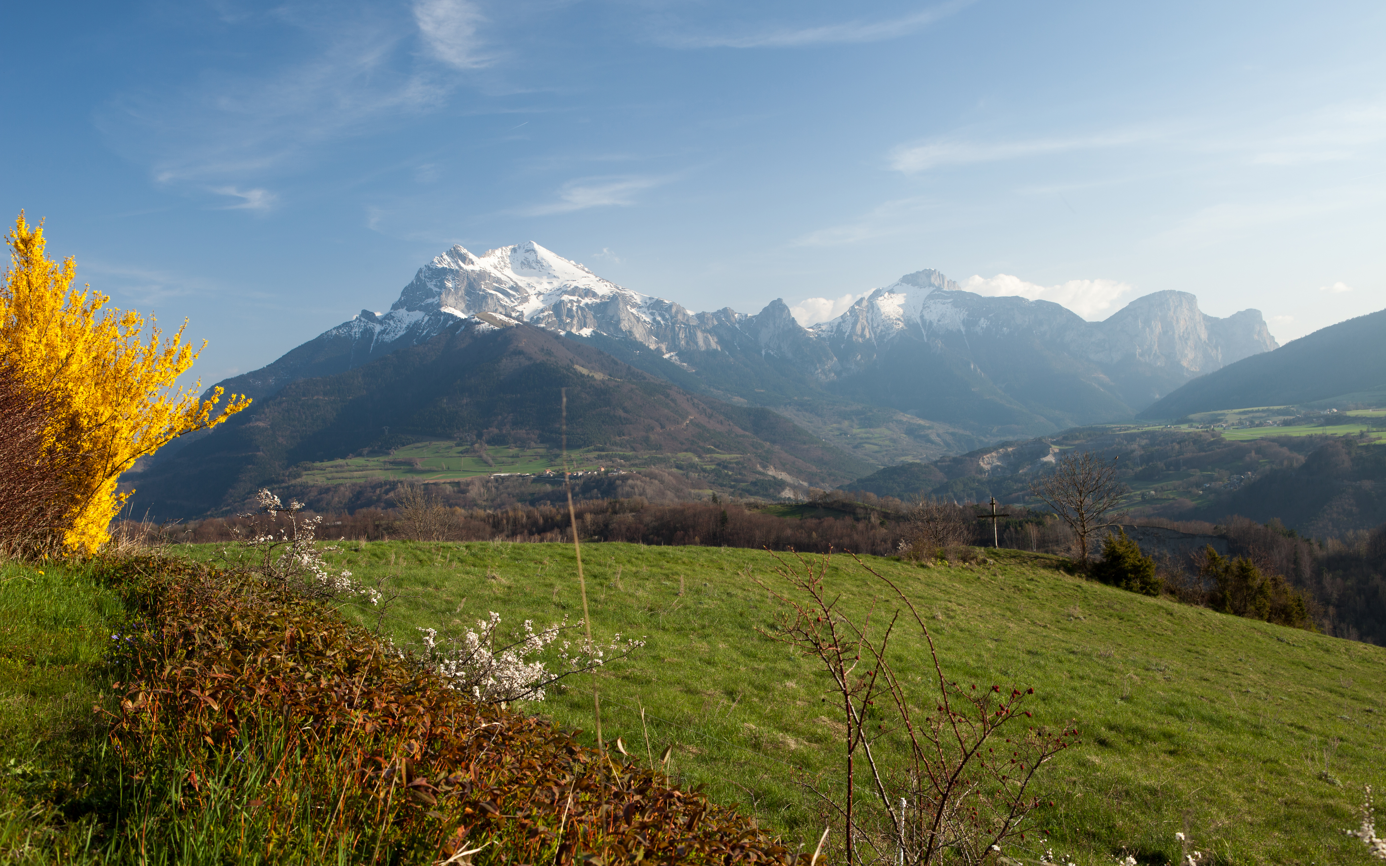 L'Obiou depuis Quet-en-Beaumont, Isère. Village de Cordéac (?).